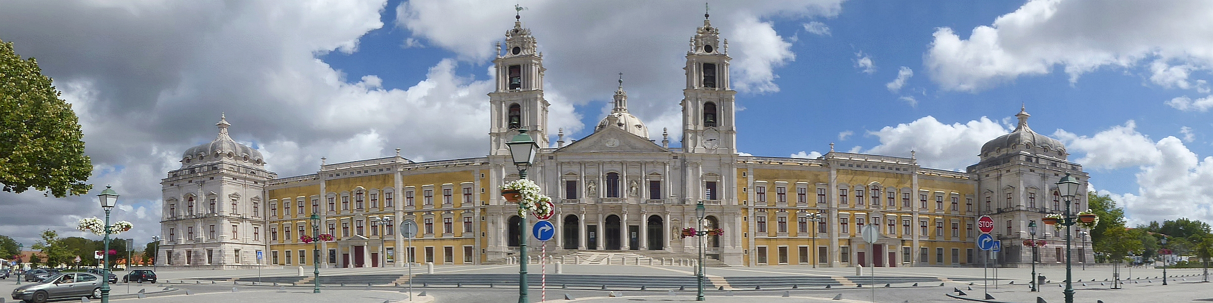 Panorama Palácio Nacional de Mafra Terreiro D. Joao V. Foto 2016 Wolfgang Pehlemann DSC00846